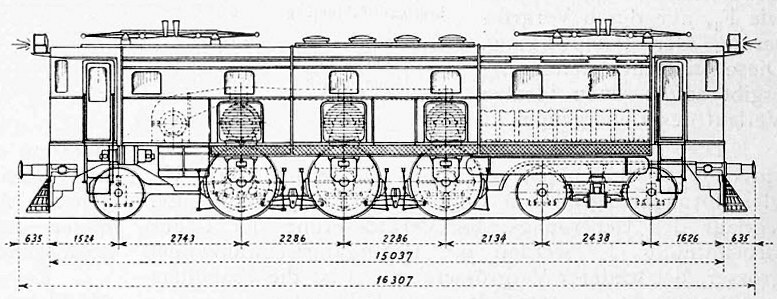 Schnellzuglokomotive, Typ 2-A3-1, für die Great Indian Peninusla Railway